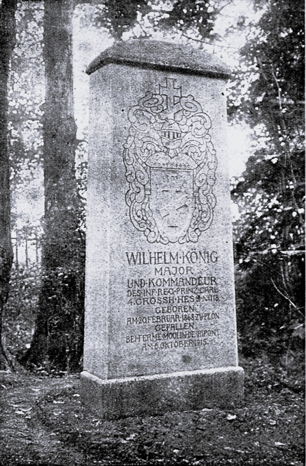 Denkmal für Major Wilhelm König.